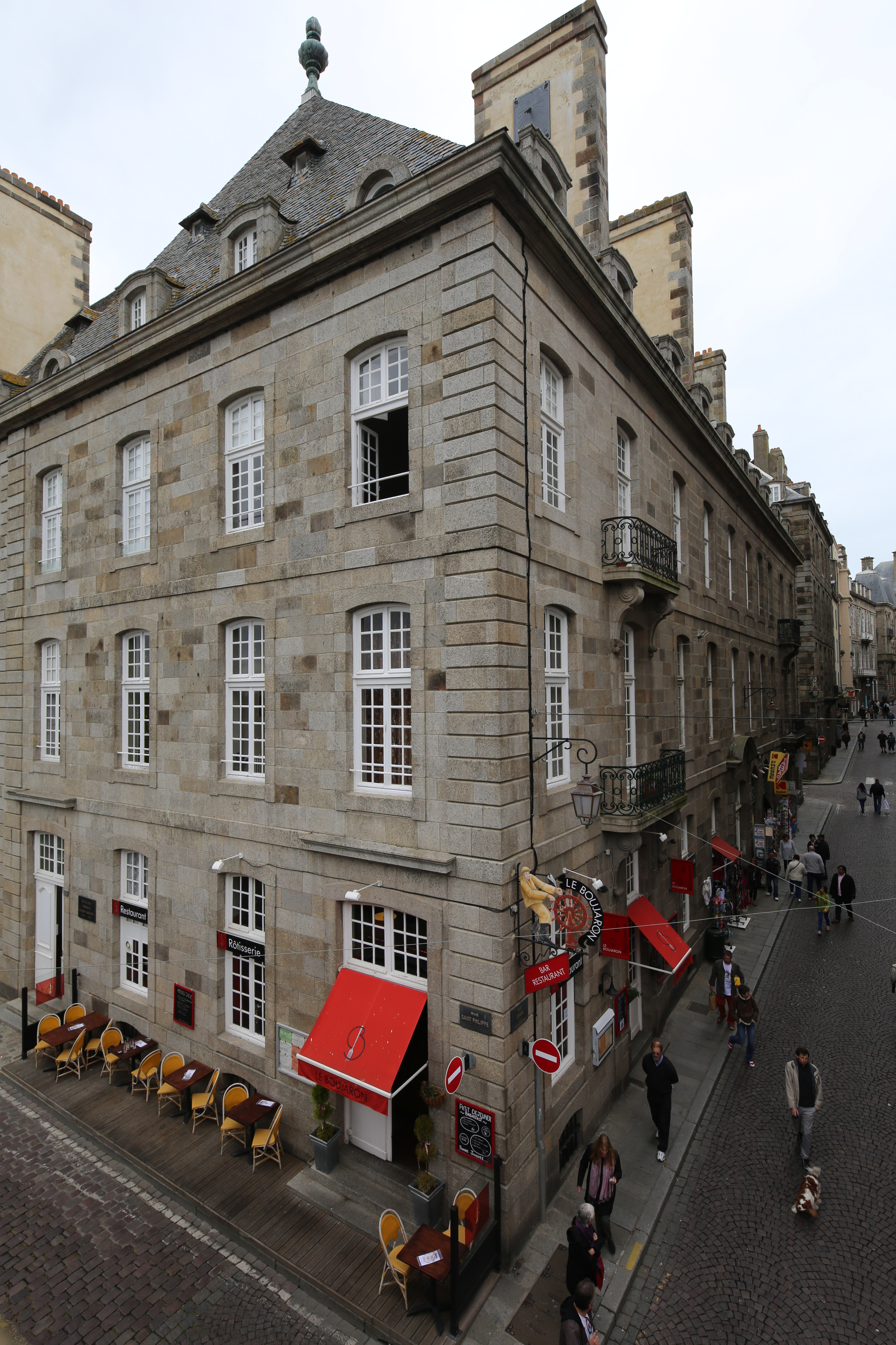 Hôtel de Robert Surcouf à Saint-Malo : angle entre les rues de Dinan et Saint-Philippe.